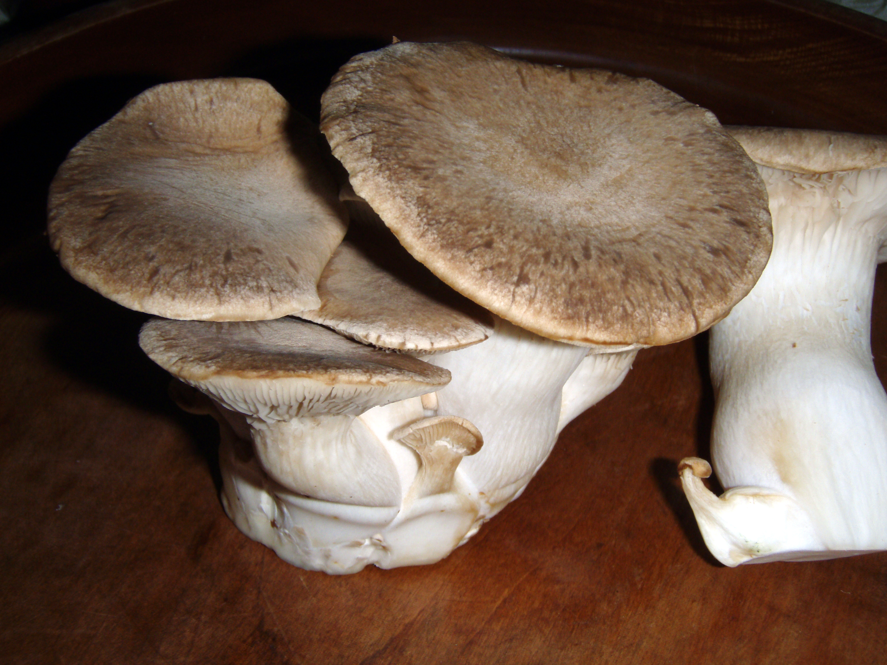 エリンギの菌床栽培品(Nagano prf. Japan)